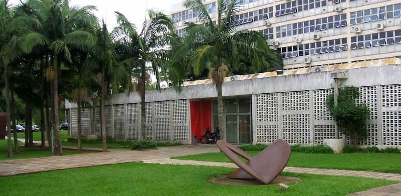 Anexo do Museu de Arte Contemporânea da Universidade de São Paulo. Cidade Universitária, São Paulo, Brasil.